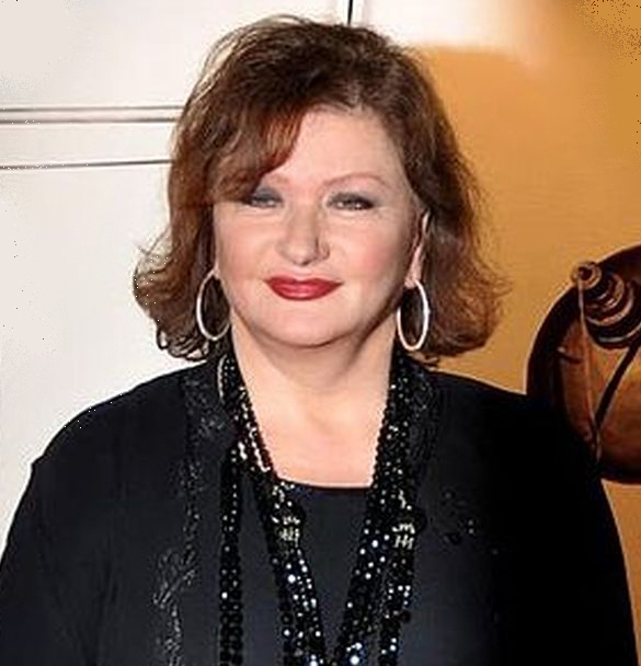 Catherine Jacob à la cérémonie des Prix Lumières